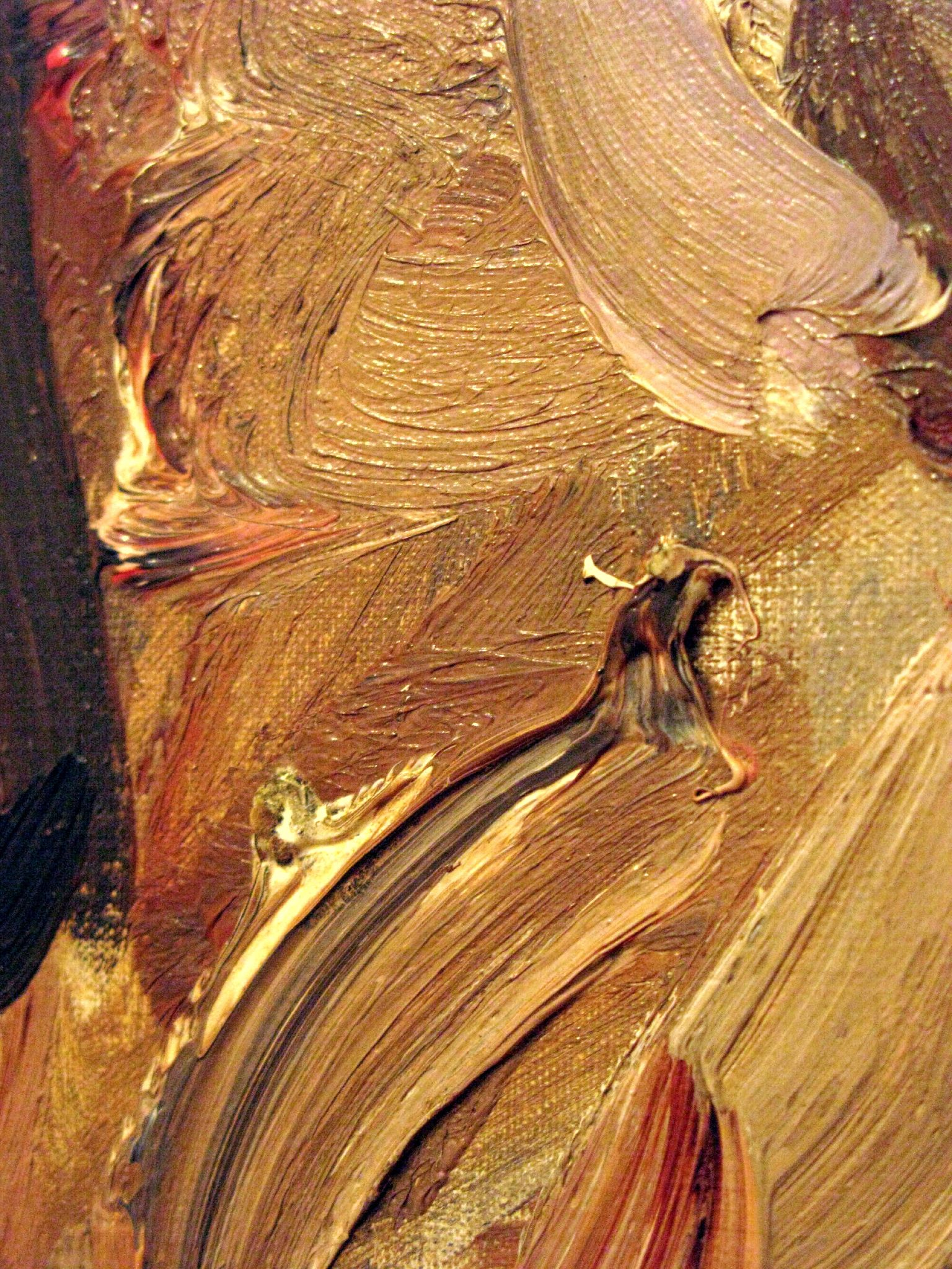 Isaac Israëls, Rendez-vous de chasse, 0861 Rendez-vous de chasse, Isaac Israëls, 1928, detail